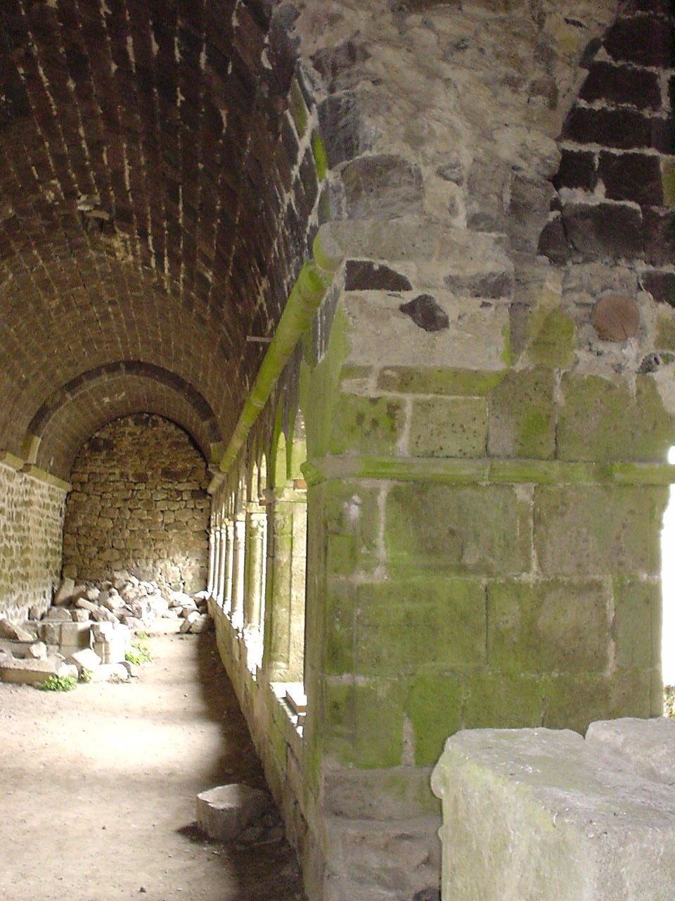 Kloster Mazan (Ardèche), Kreuzgang, Südseite